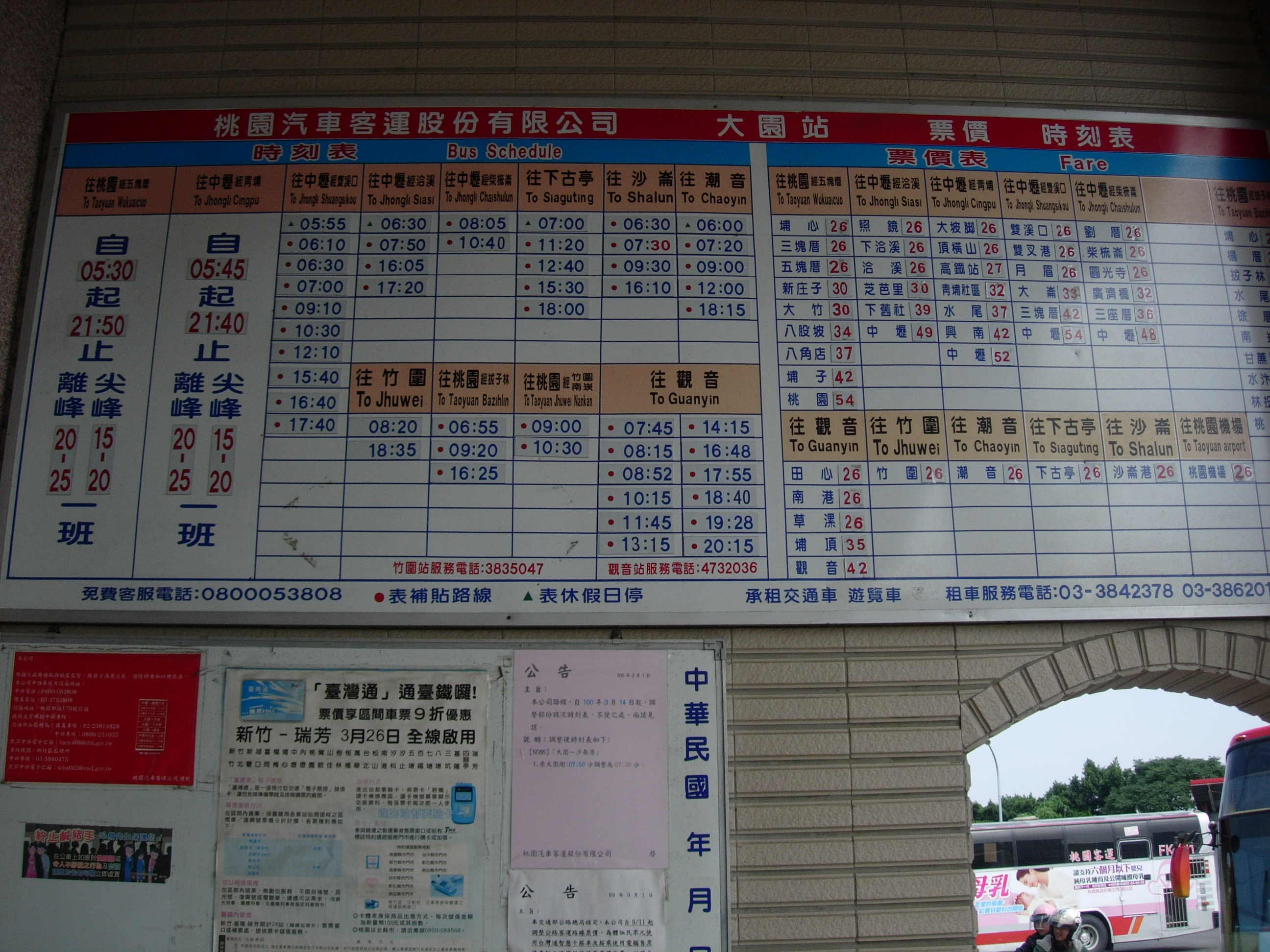 中文（台灣）: 桃園客運大園站票價時刻表